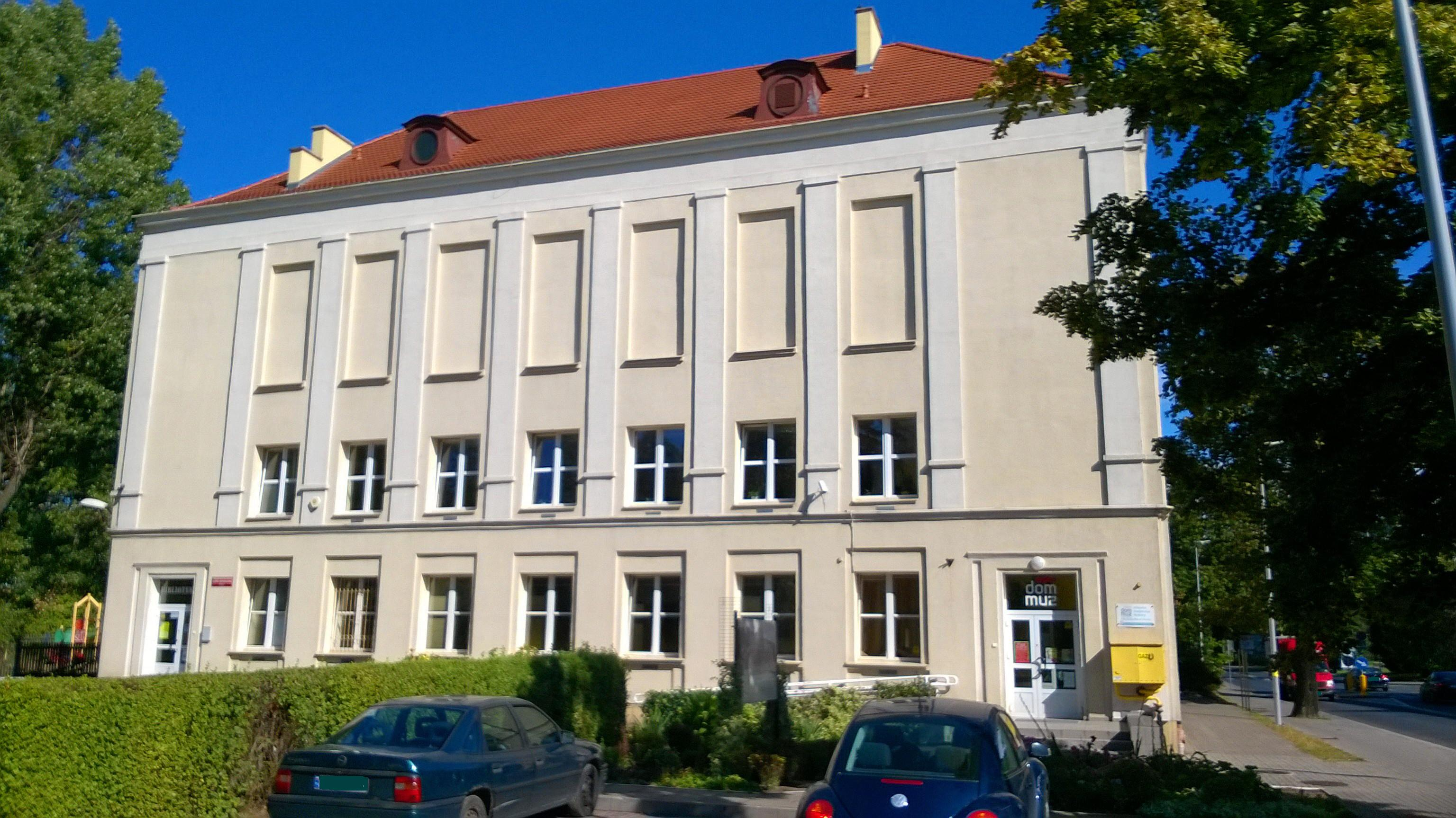 Dom Muz w Toruniu